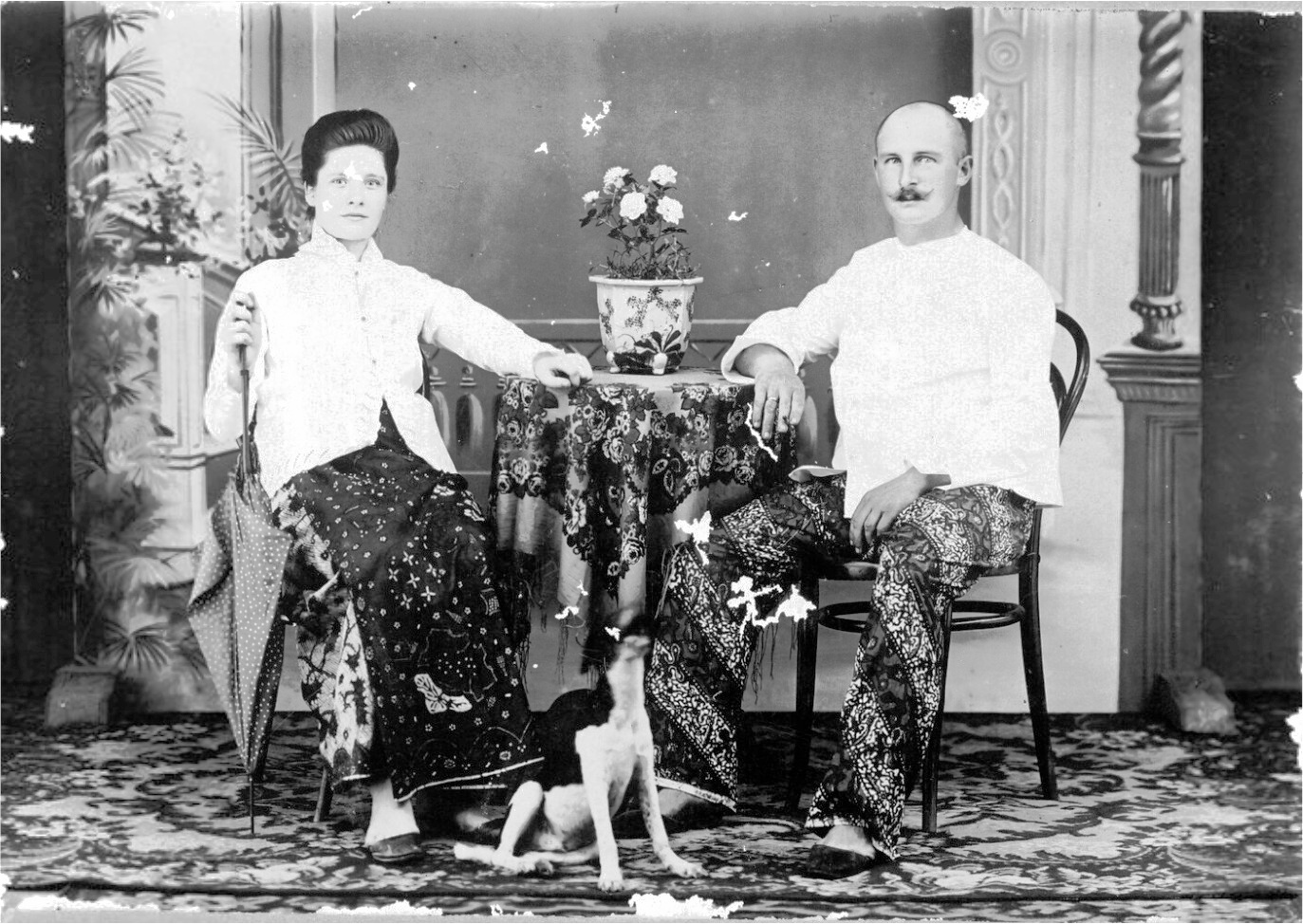 Foto. Studioportret van een Europees echtpaar gekleed in saroeng kabaja en ochtendbroek